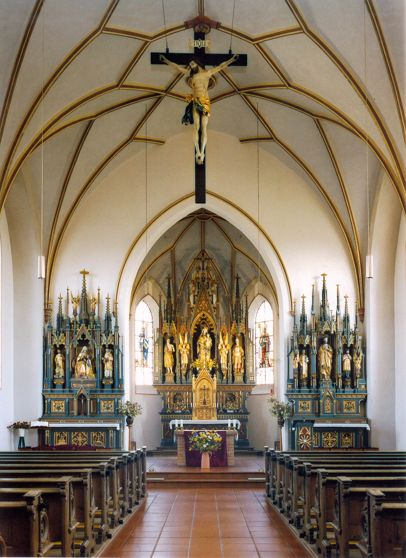 Innenansicht der Kirche